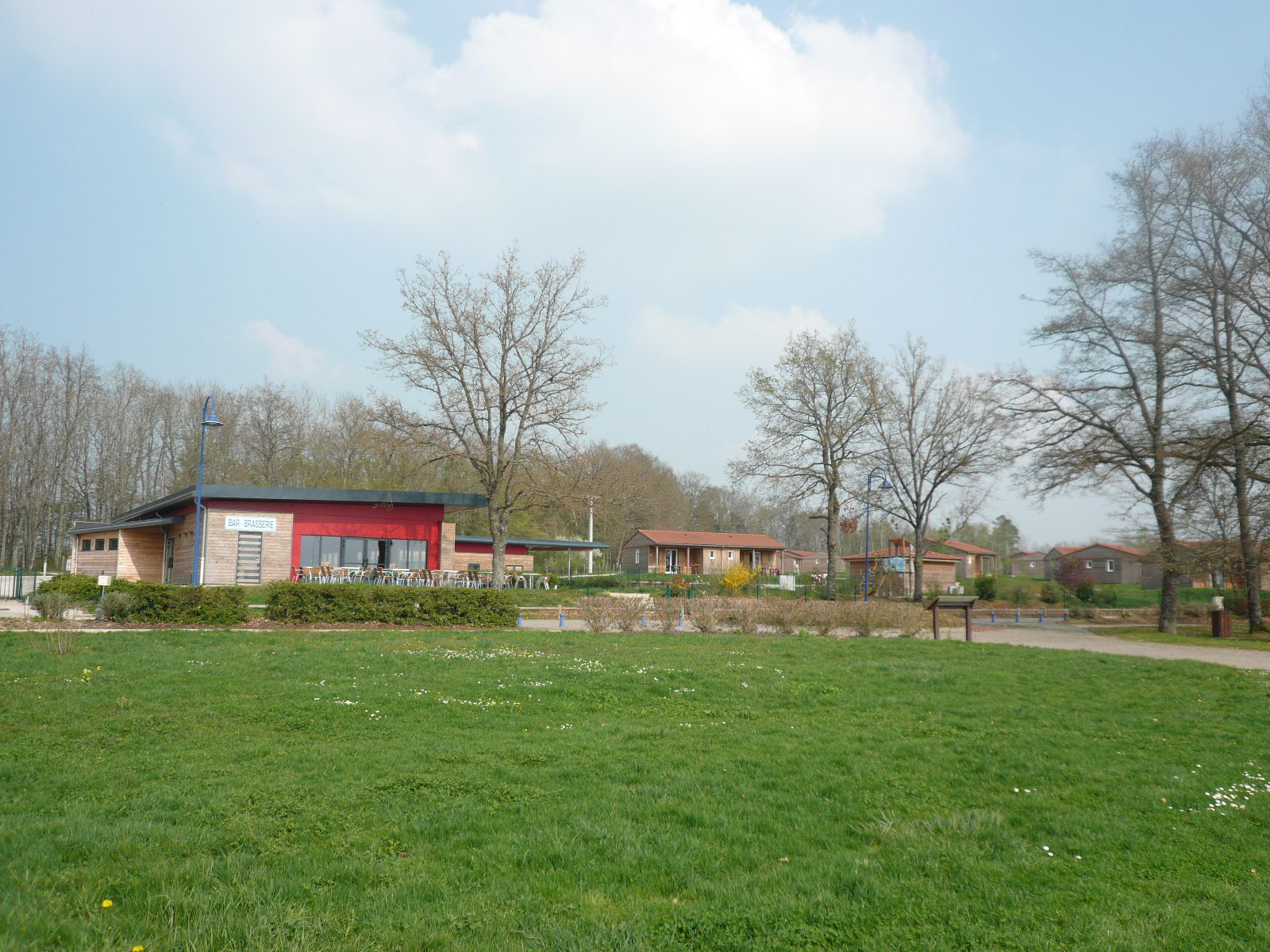 Lac de la Vingeanne et environs